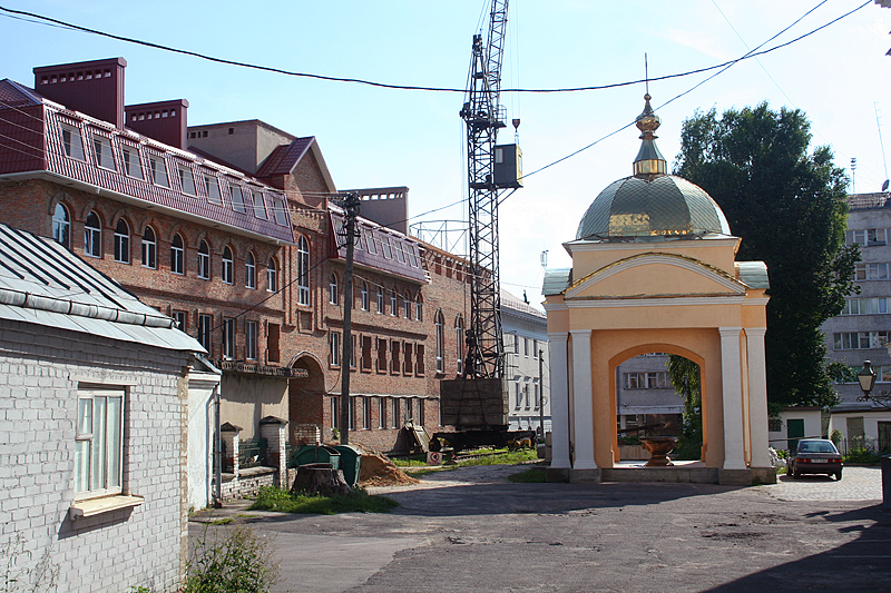 Seminarium